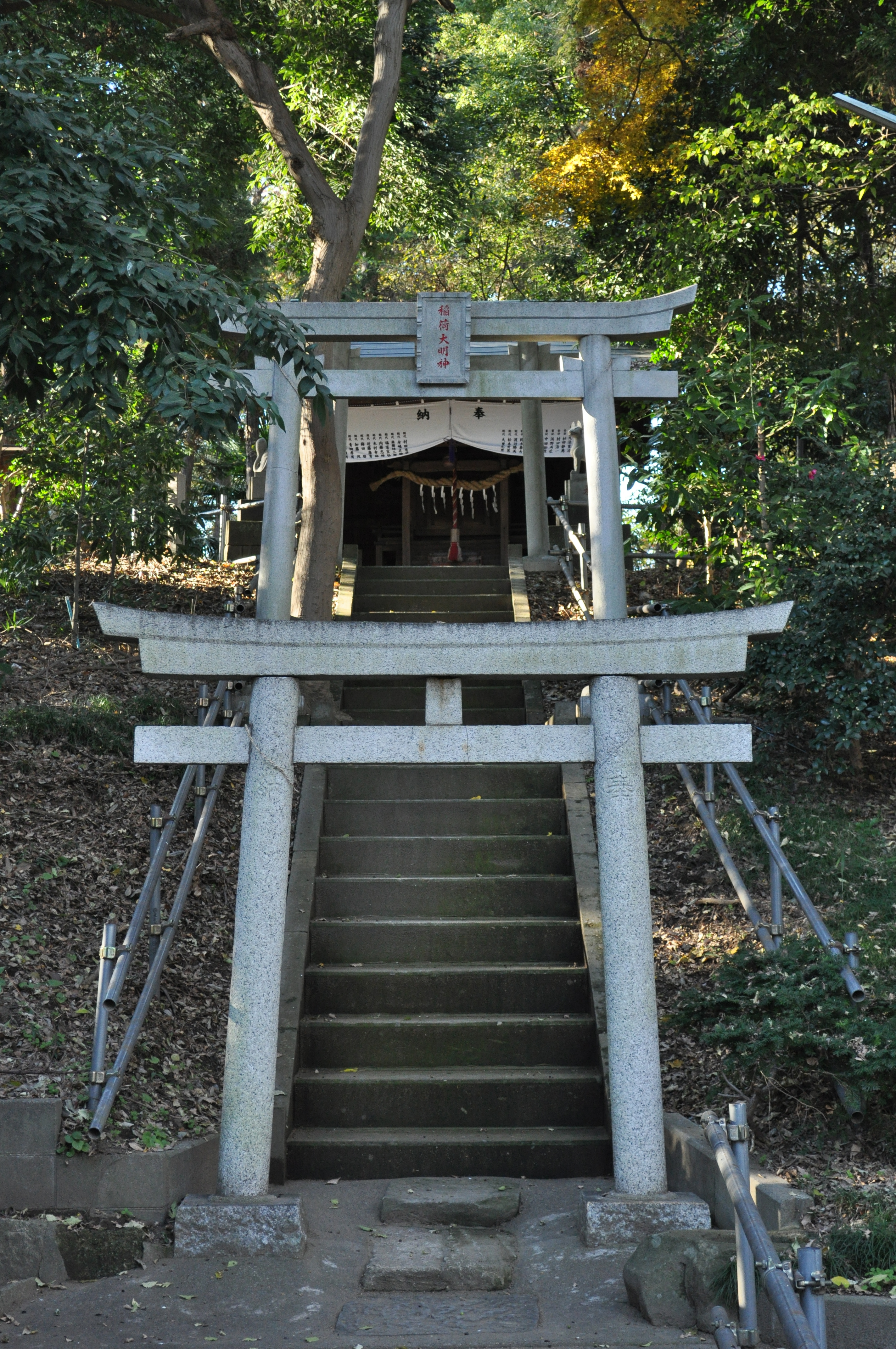 春日部稲荷大明神